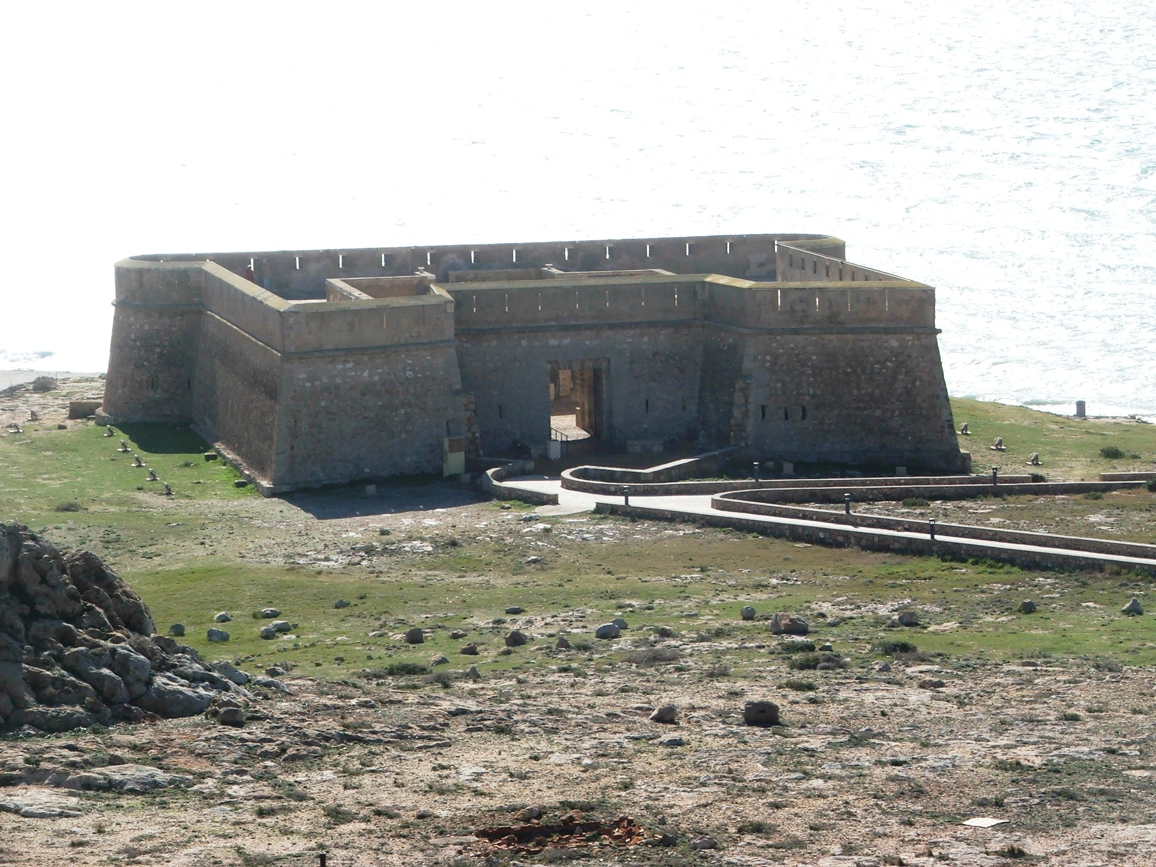 Fotografía de la entrada del castillo de Guardias Viejas en El Ejido, provincia de Almería, Andalucía, España, visto desde el noreste.